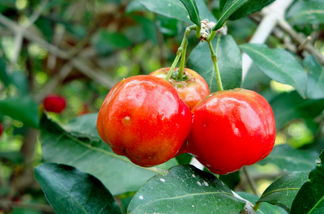 Esta foto foi tirada de uma aceroleira com frutos, no estado de Minas Gerais- Brasil.